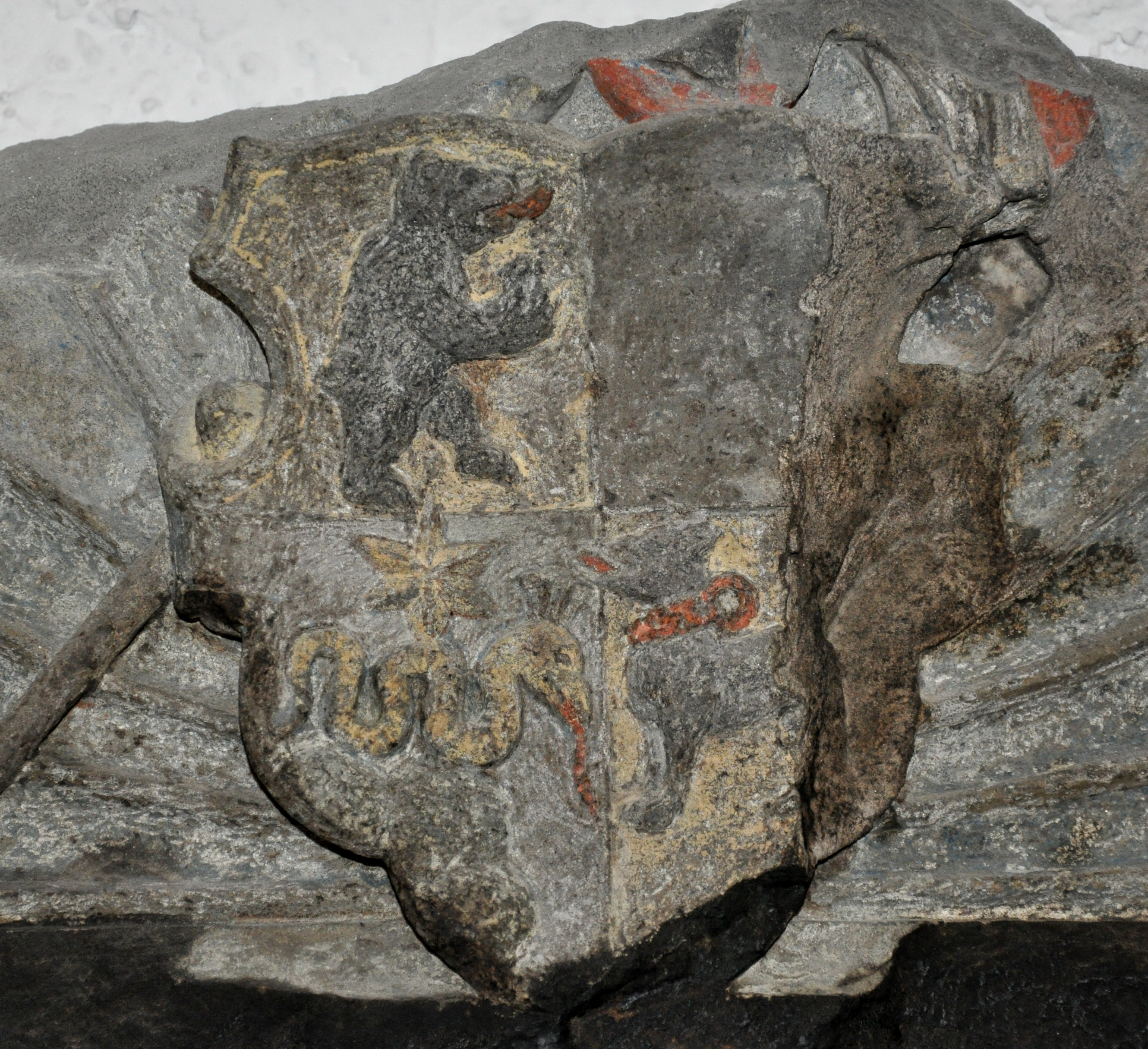 St. Gallen, Lapidarium, Kaminsturz mit dem Wappen des Abts Otmar Kunz, Detail: Wappen